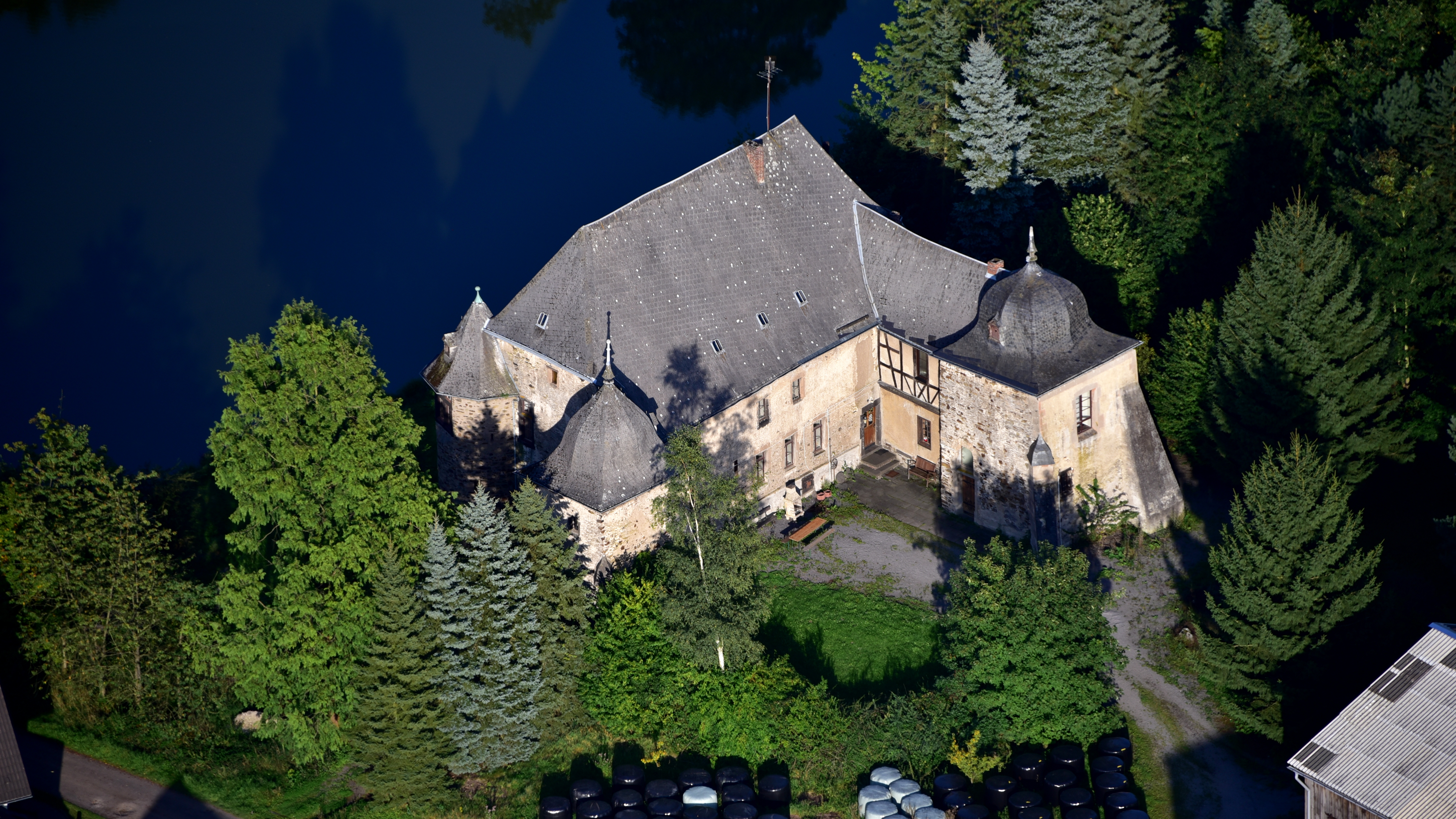 Krayer Hof, Luftaufnahme (2017)